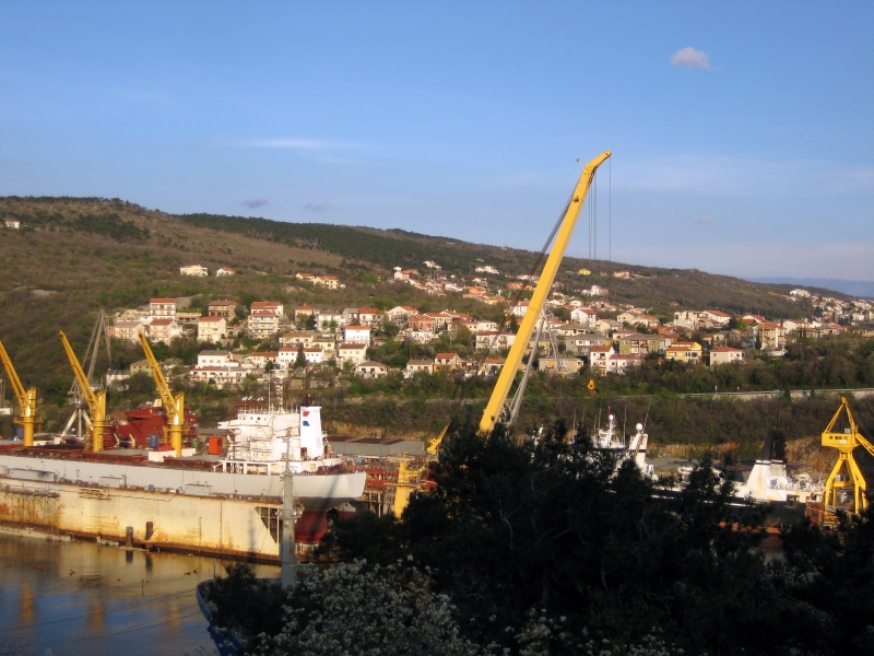 Vrh Martinšćice, Kostrena, brodogradilište Viktor Lenac